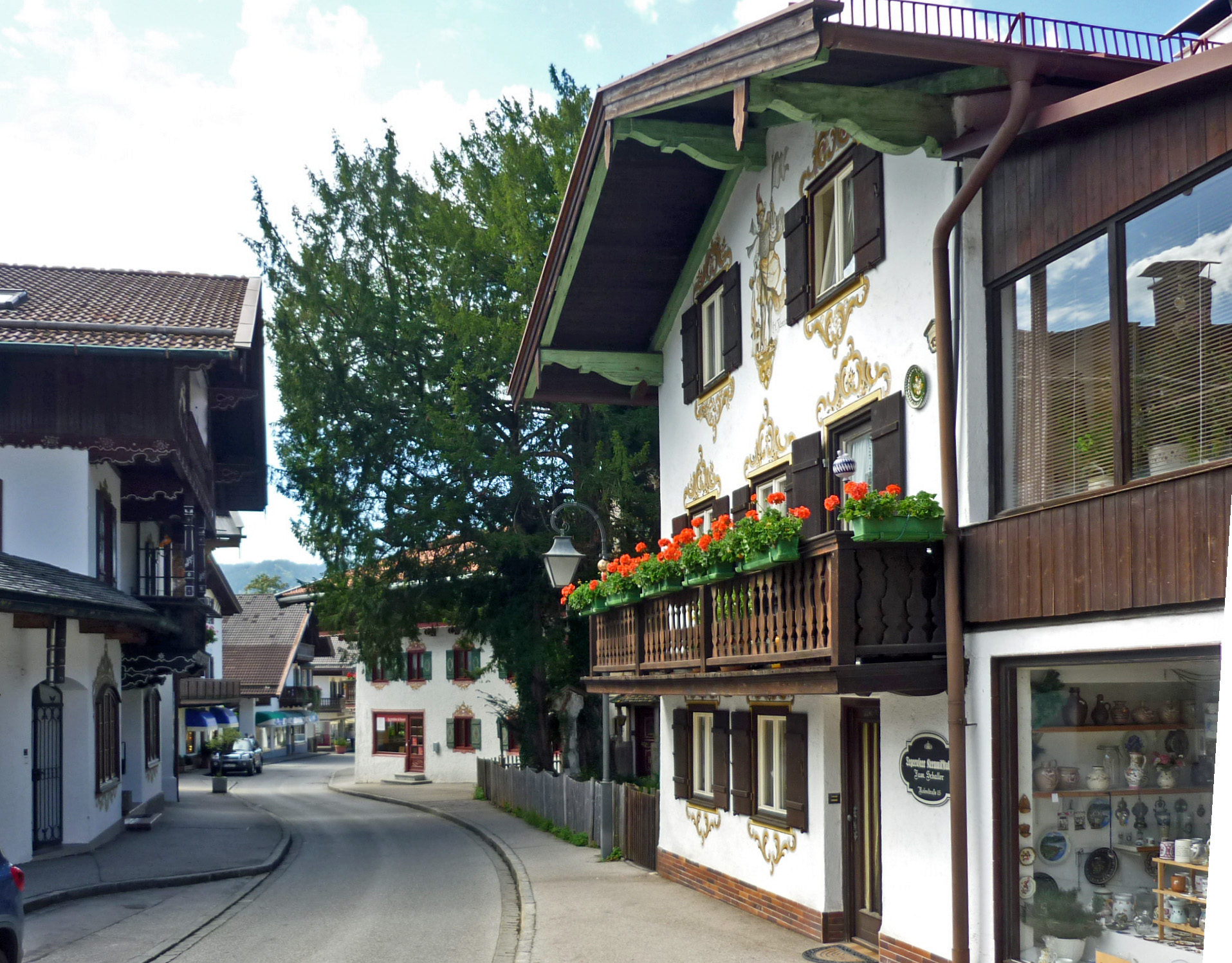 Rosenstraße 15 in TegernseeThis is a photograph of an architectural monument.